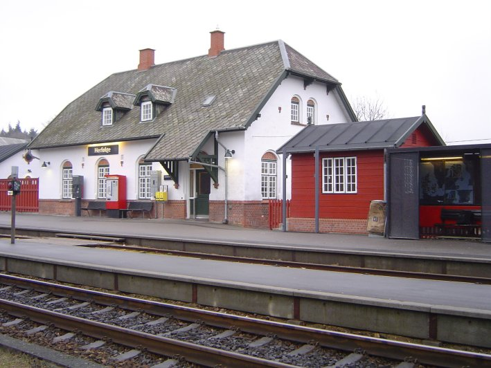 Herfølge station, perronside (vestfacade) 2007